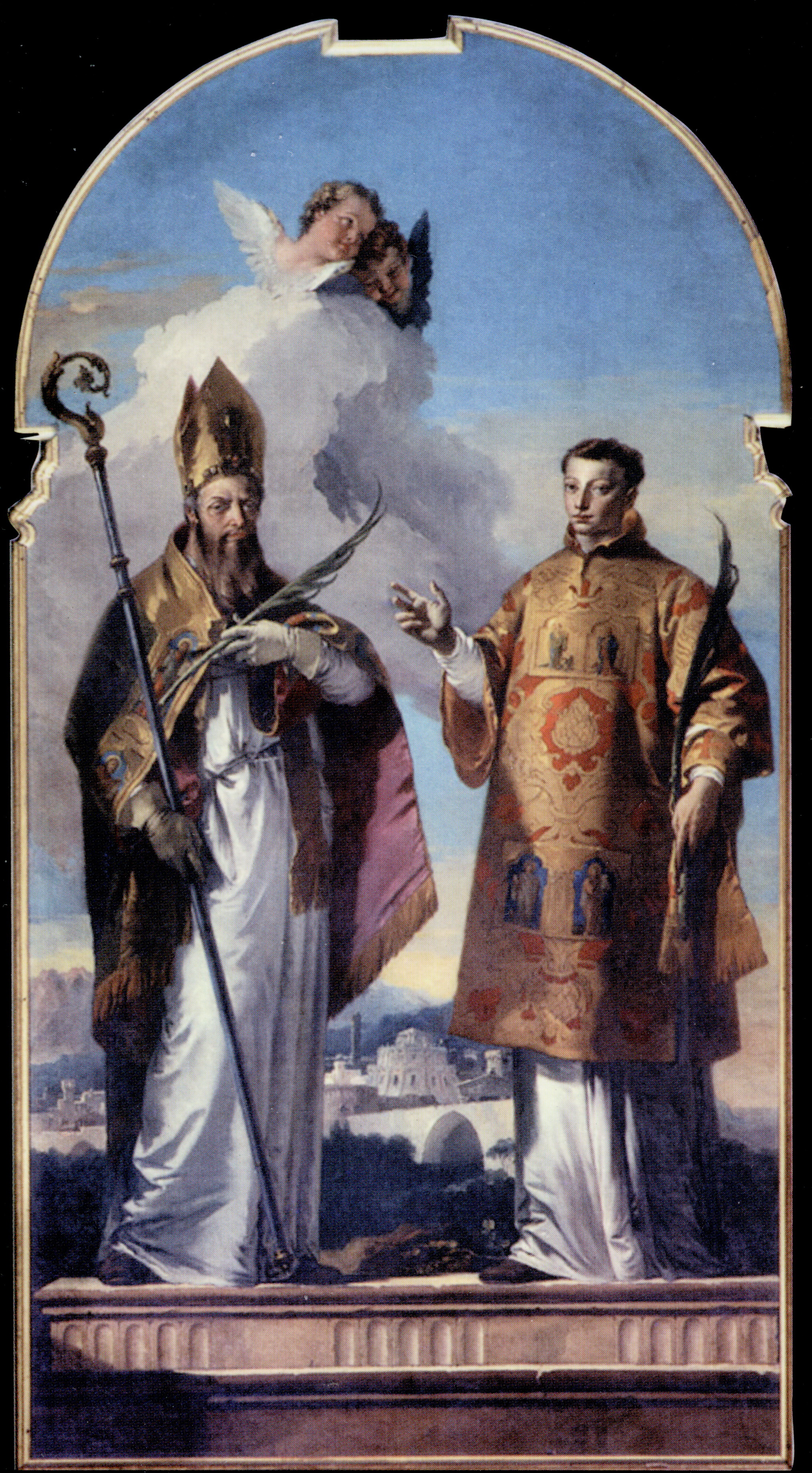 Duomo di Udine - Giambattista Tiepolo - Santi Ermacora e Fortunato